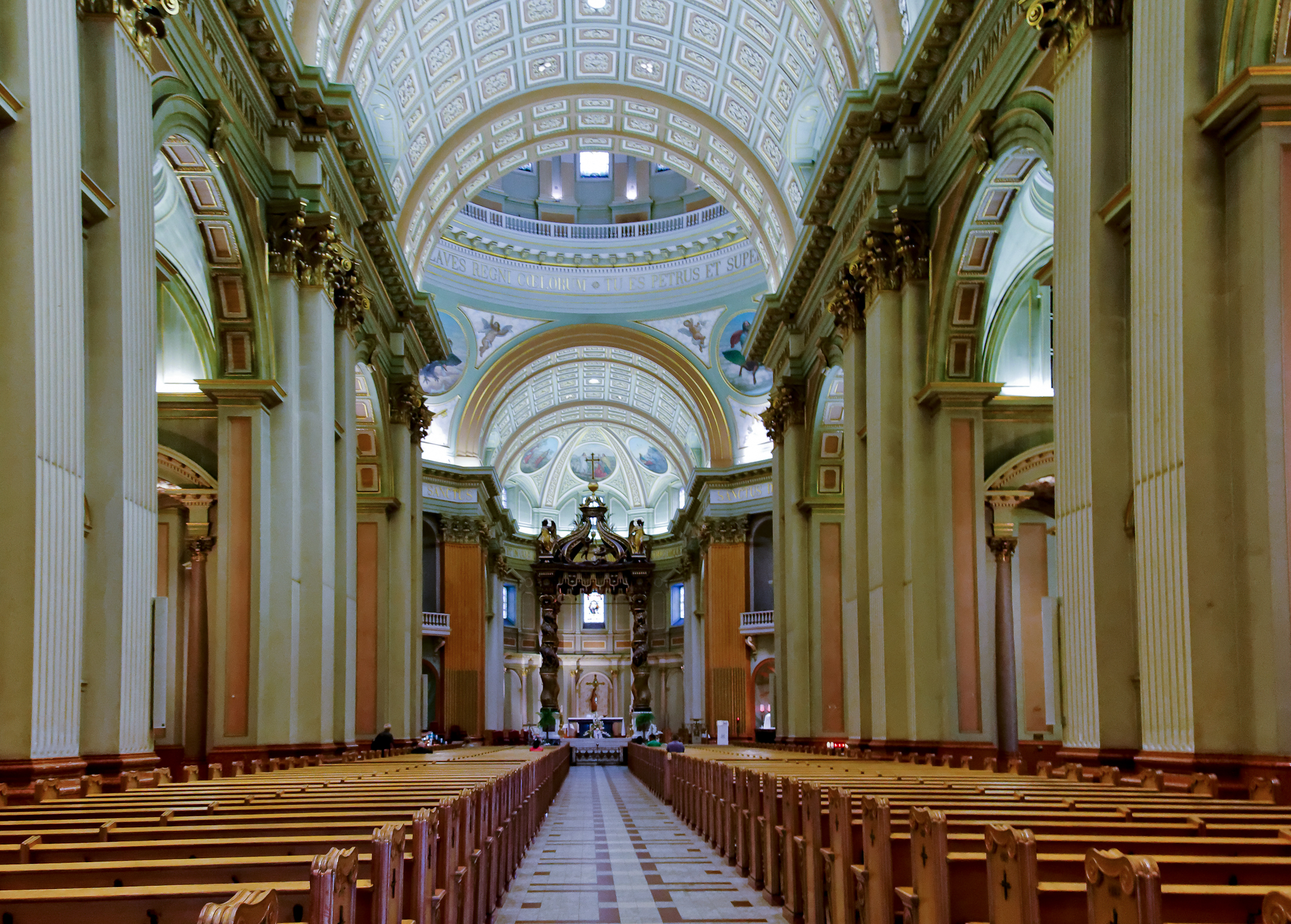 Cathédrale Marie-Reine-du-Monde, 1085, rue de la Cathédrale, (Canada). (Protection LHN. Voir la liste des lieux patrimoniaux de Montréal pour plus de détails).